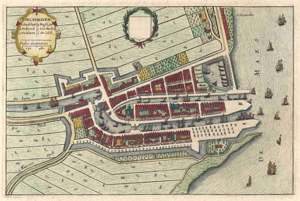 title: Delfshaven; size: 15 x 22,5 cm